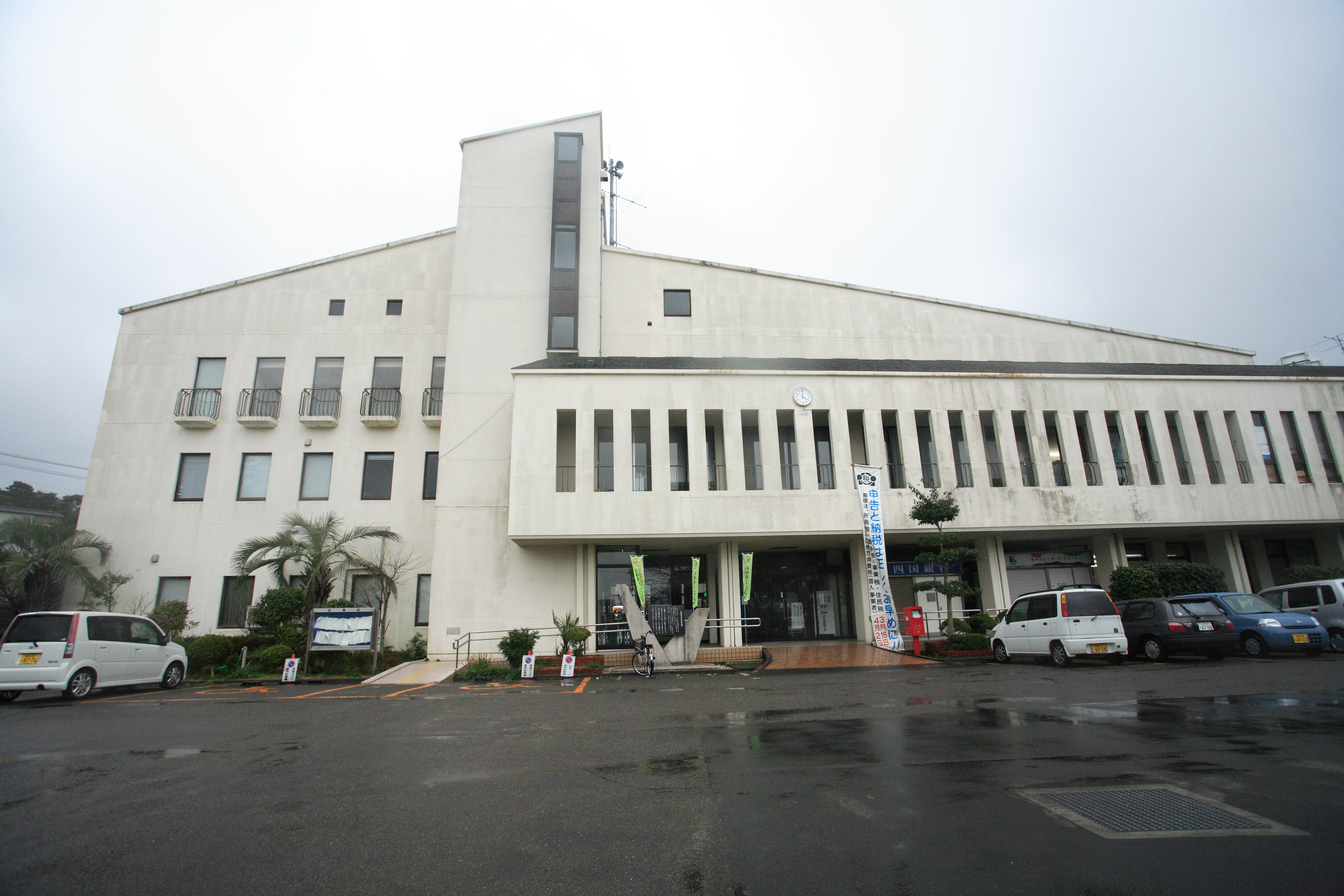 Tosashimizu city hall, Tosashimizu, Kochi, Japan.